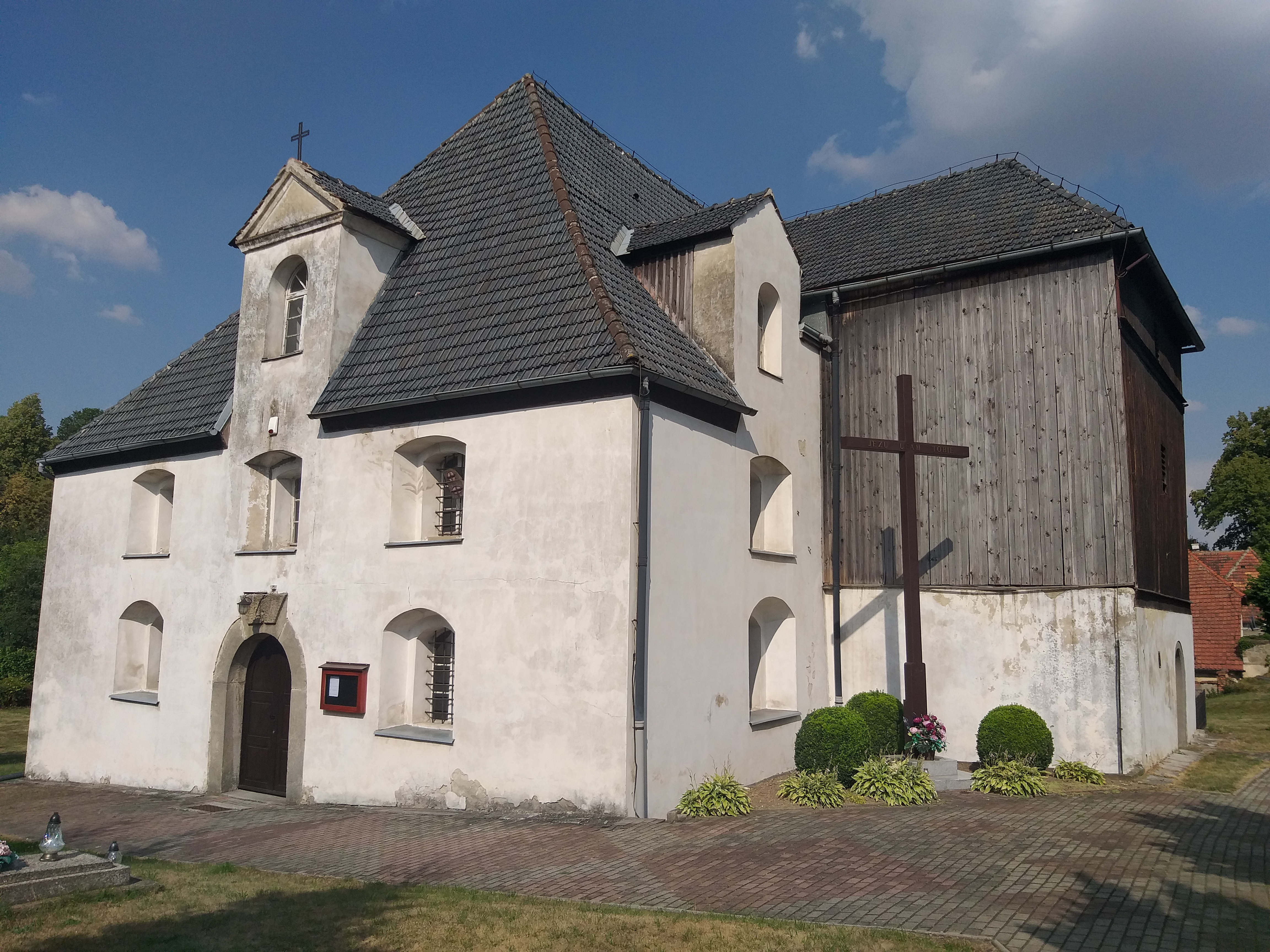 Kościół rzymskokatolicki pochodzący z późnego średniowiecza